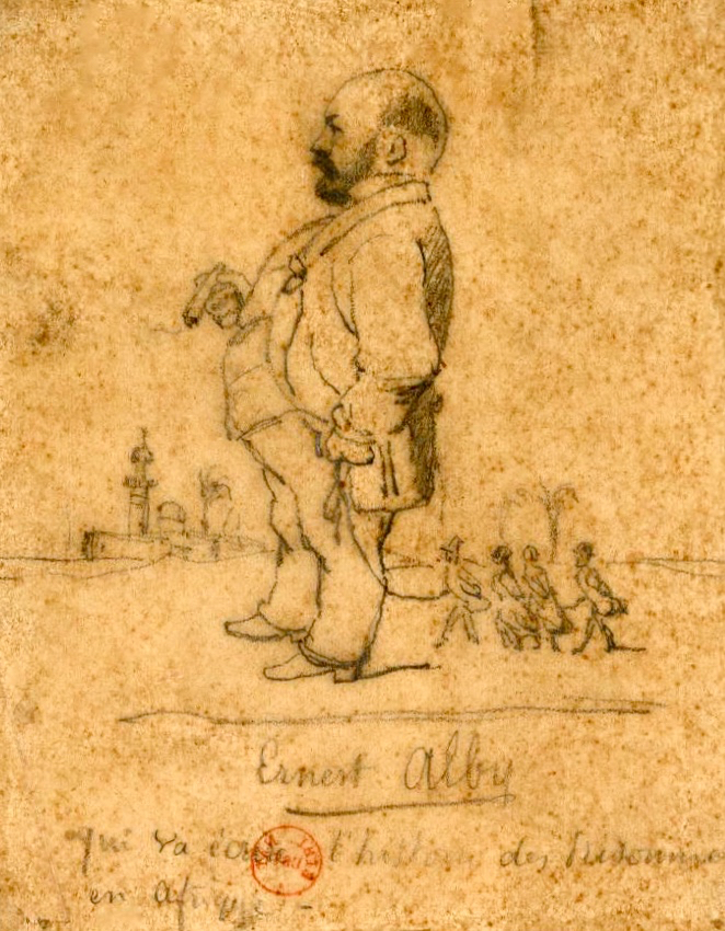 Ernest Alby, caricature par le dessinateur Nadar (1820-1910). Légende : Ernest Alby qui va écrire l'histoire des prisonniers en Afrique.